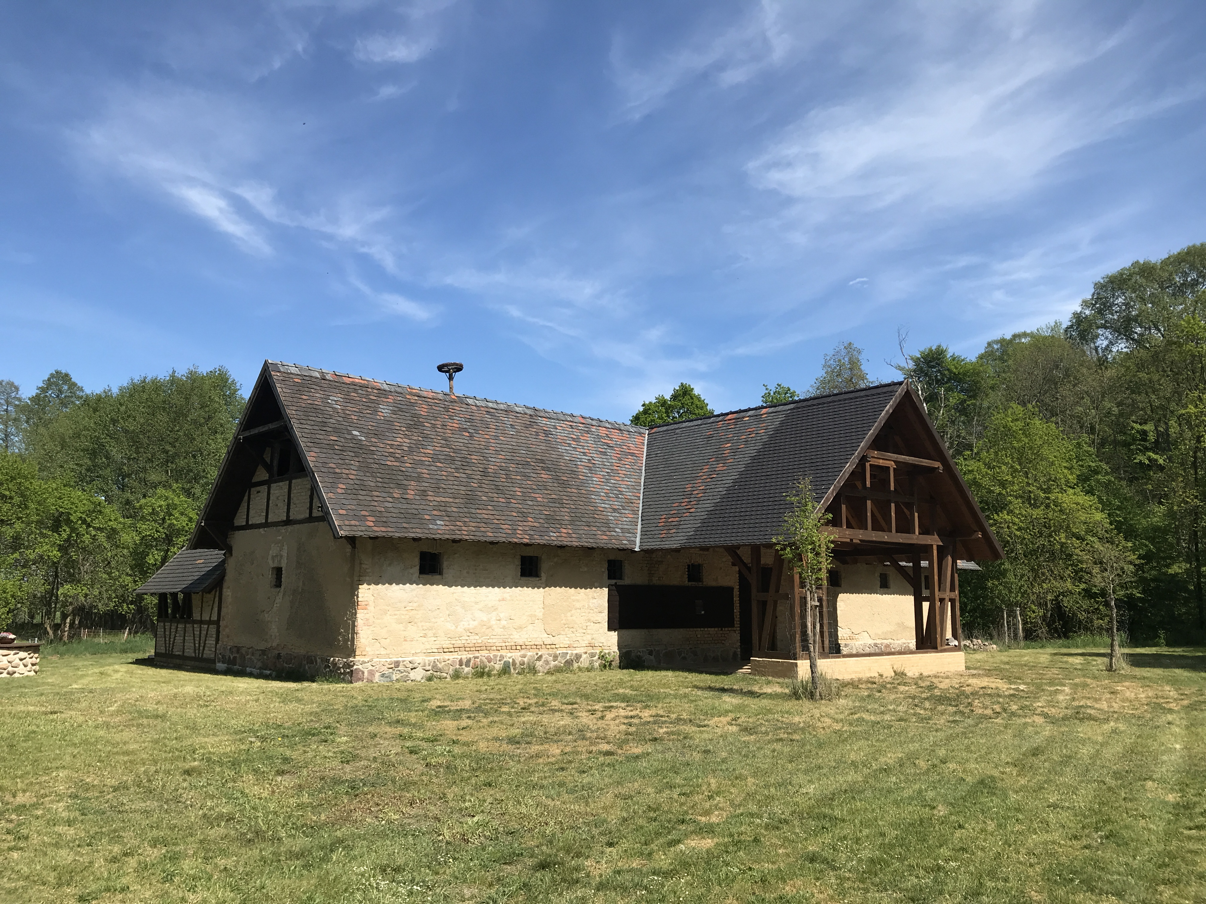 Die Horstmühle ist ein Wohnplatz mit einem denkmalgeschützten Ensemble einer ehemaligen Mühle in Baruth/Mark in Brandenburg.